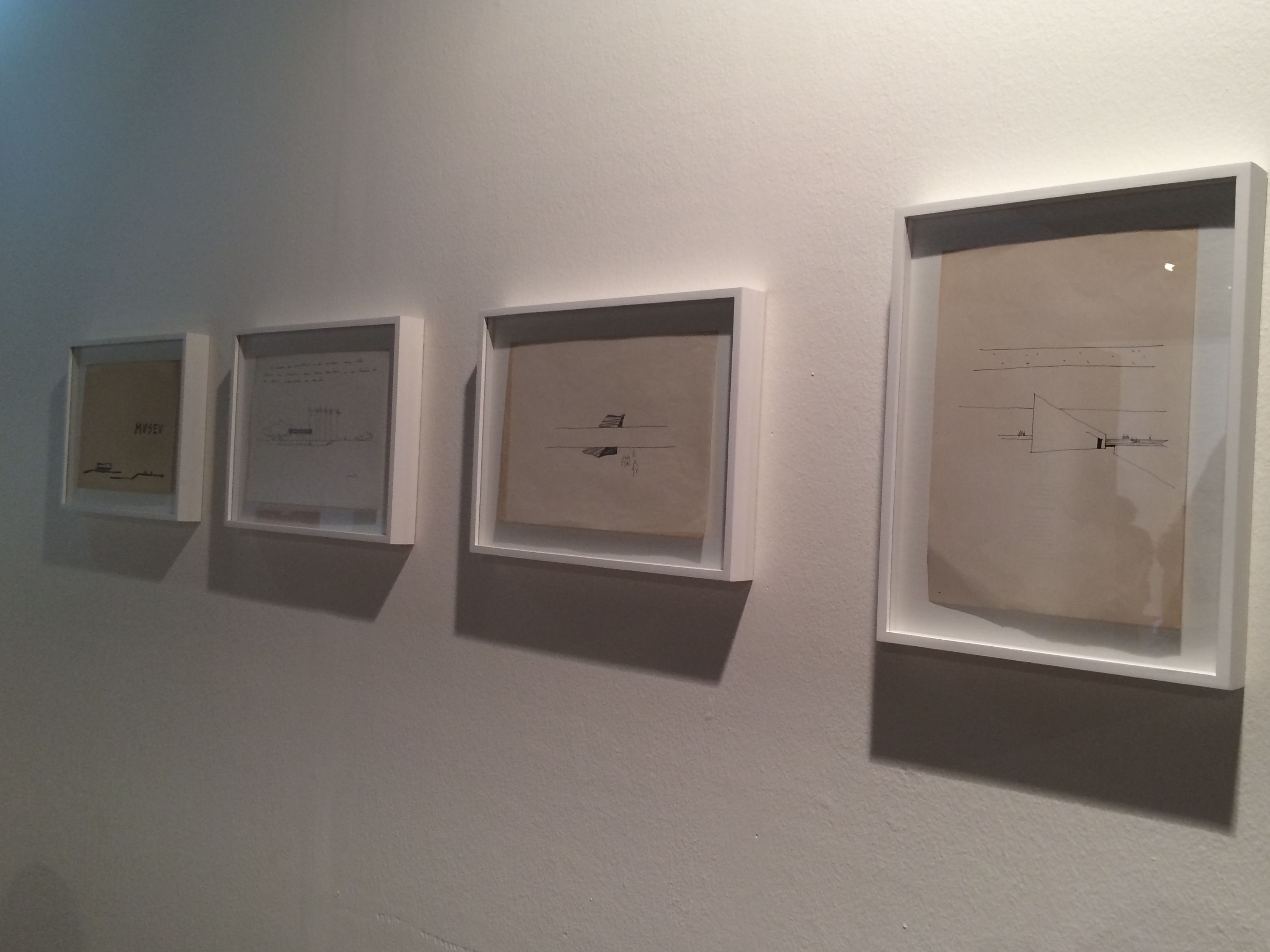 Desenhos do projeto do Museu Brasileiro da Escultura feito por Paulo Mendes da Rocha